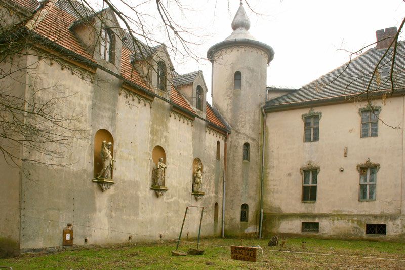 Rzeźby antyczne w niszach ścian pałacu w Gaju Małym Autor: Michał "Cronwood" Babilas